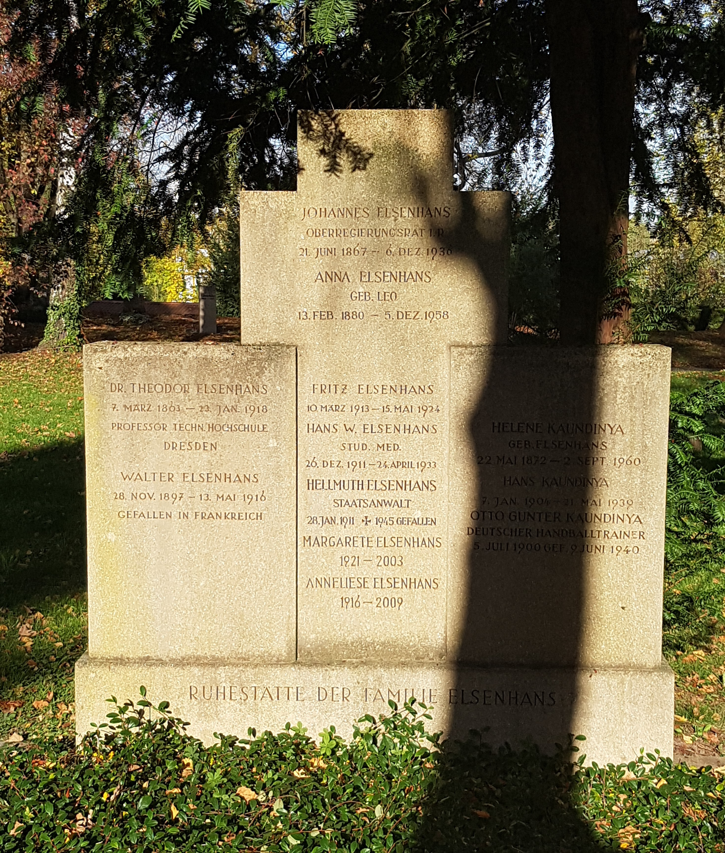 Grabstätte von Theodor Elsenhans auf dem Pragfriedhof in Stuttgart